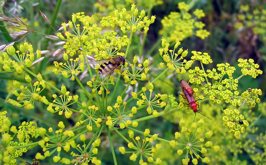 Beschreibung: Echte Pastinake (Pastinaca sativa) Fotograf: Darkone, 25. Juli 2004